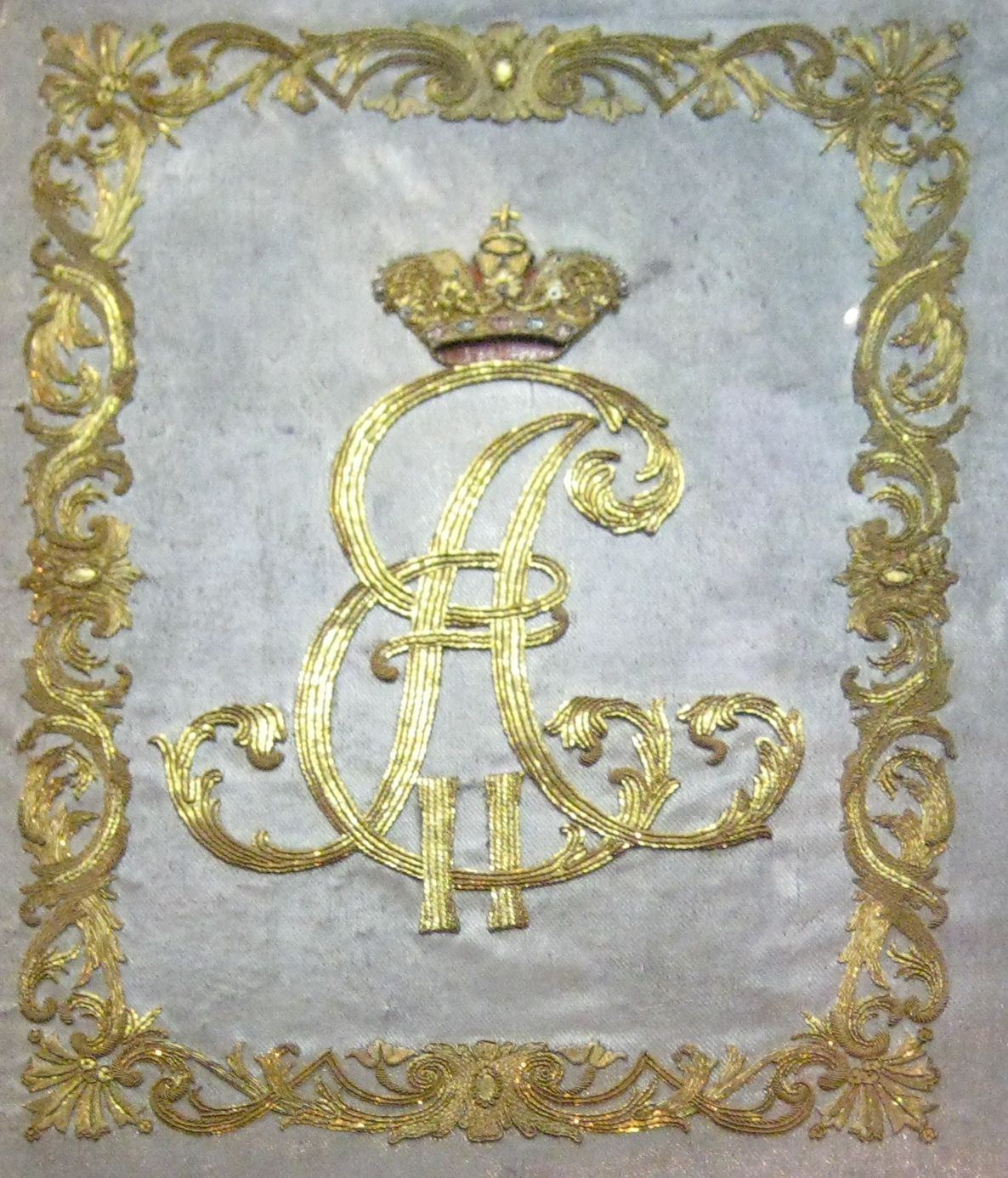 Жалованная грамота императрицы Екатерины II на графское достоинство Г.Г. Орлову. Санкт-Петербург, 1 июля 1763. Пергамен, чернила, акварель, гуашь, позолота, шелк. Кустодия - серебро, позолота. Пожалован в день коронации Екатерины II 22 сентября 1762 года.